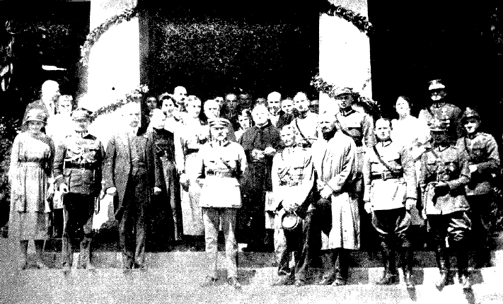 Józef Piłsudski w Samostrzelu u państwa Bnińskich. Obok Piłsudskiego gen. Kazimierz Raszewski i gen. Zieliński.